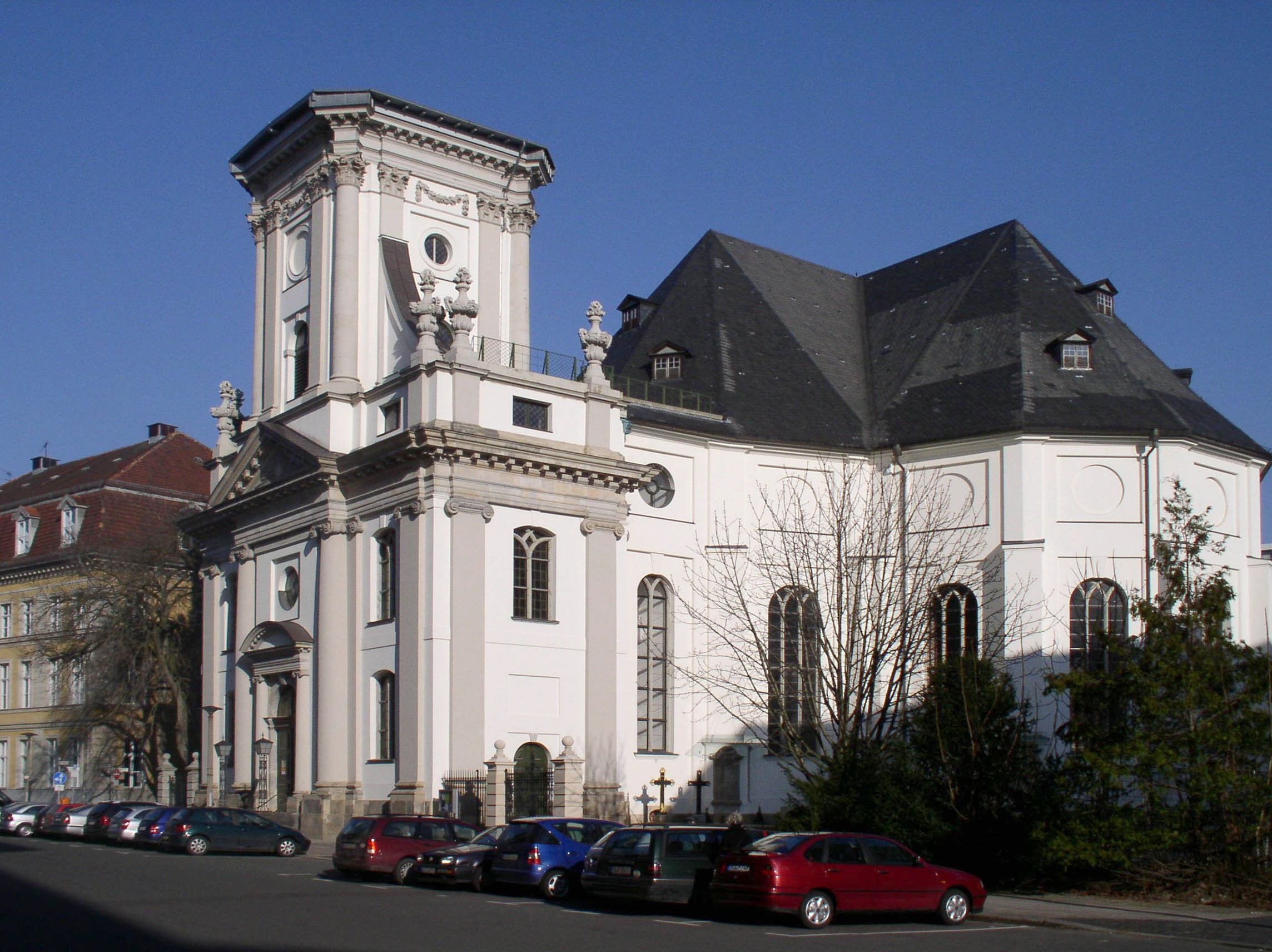 Parochialkirche in Berlin-Mitte